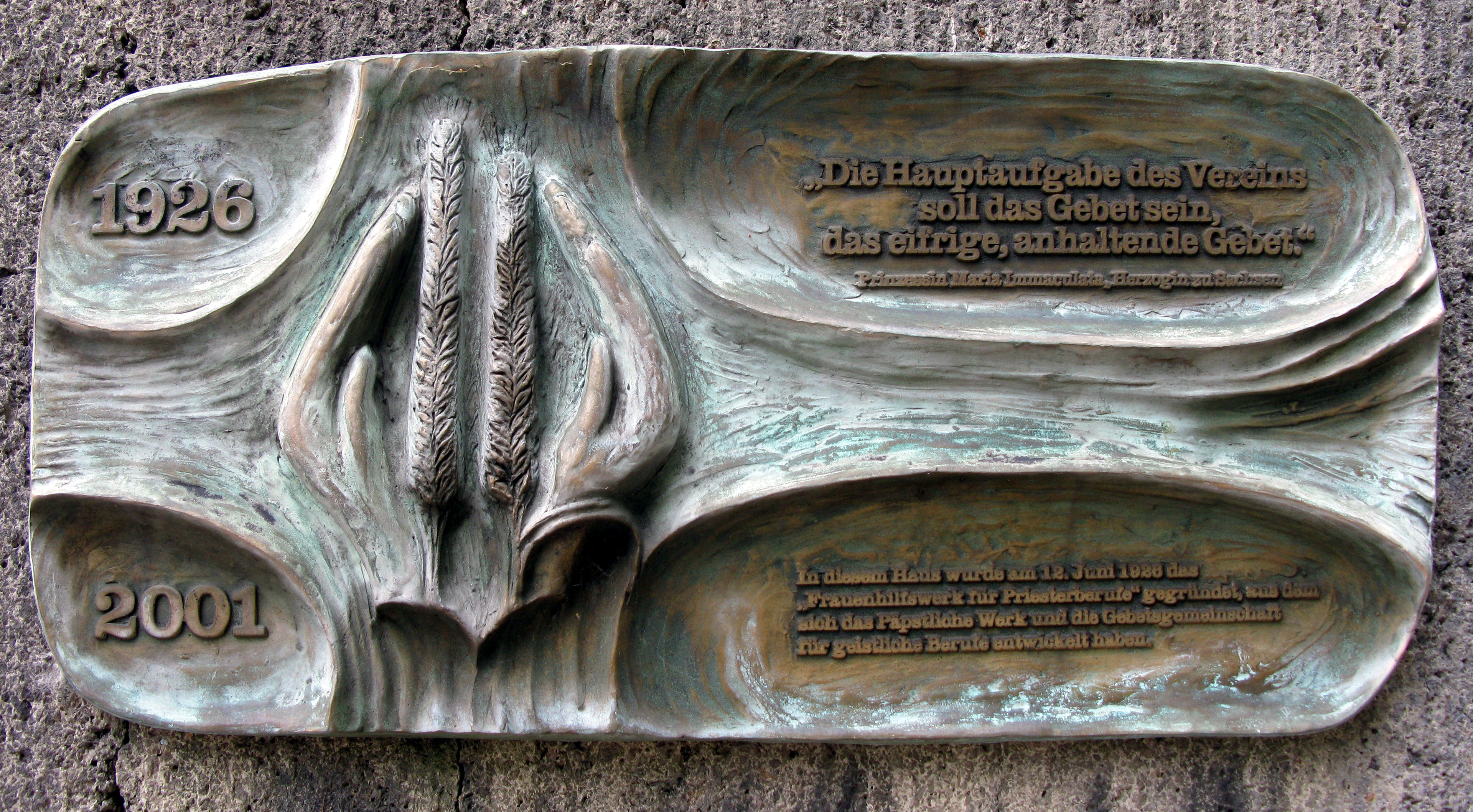 Gedenkplakette zur Gründung des Frauenhilfswerk für Priesterberufe am 12. Juni 1926, am Lorettokrankenhaus in Freiburg